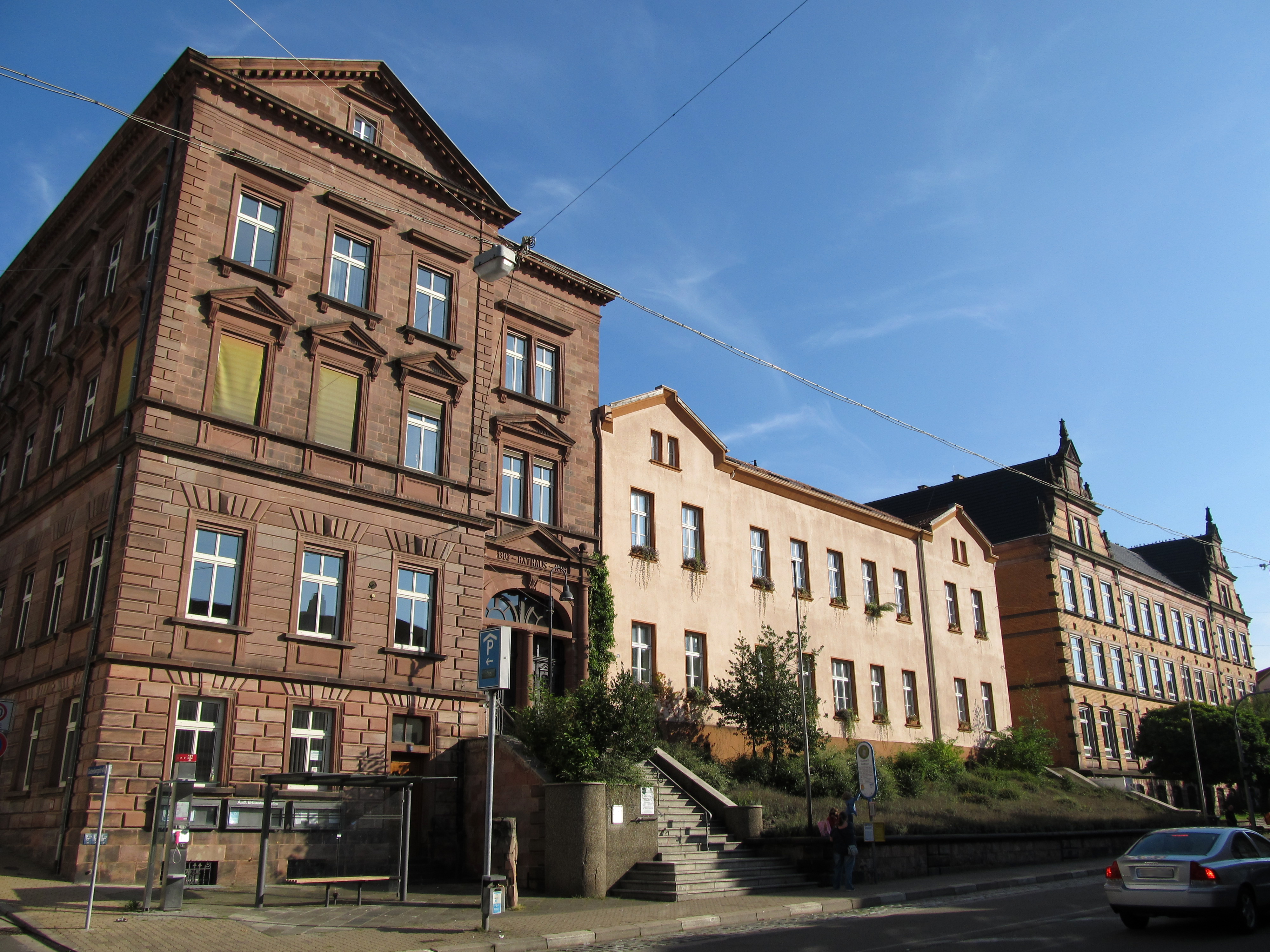 Das Rathaus in Sulzbach, Saarland